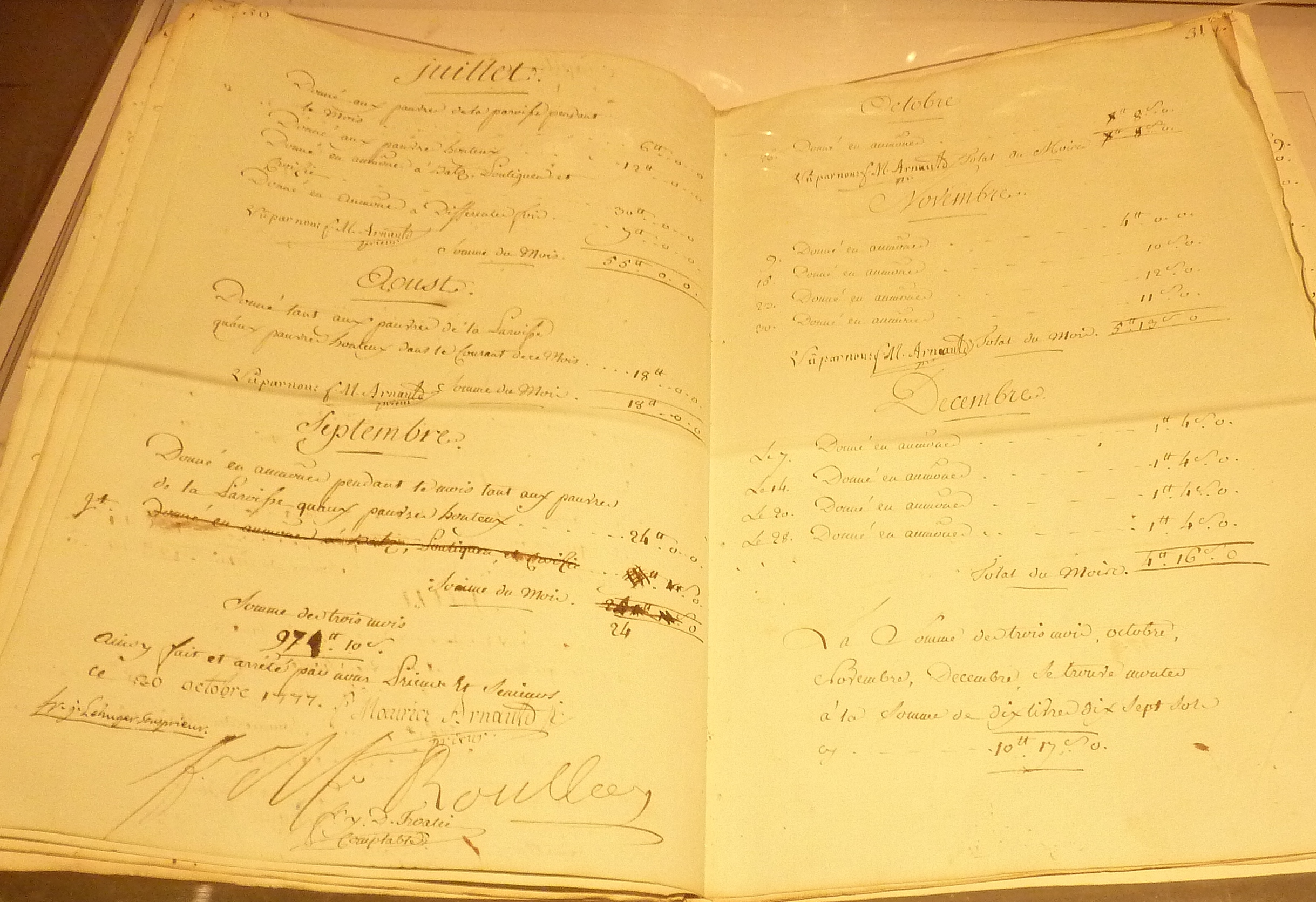 Abbaye de Landévennec : registre du frère dépositaire de l'abbaye (1777-1779) ; le frère dépositaire était chargé de tenir le registre des dépenses du monastère ; la page photographiée montre les dépenses consacrées aux aumônes faites aux pauvres ; le registre distingue les "pauvres à la porte" (ceux qui mendient en permanence à la porte du monastère), les "pauvres passants" (qui ne font que passer) et les "pauvres honteux" (ceux qui tentent de cacher leur pauvreté).